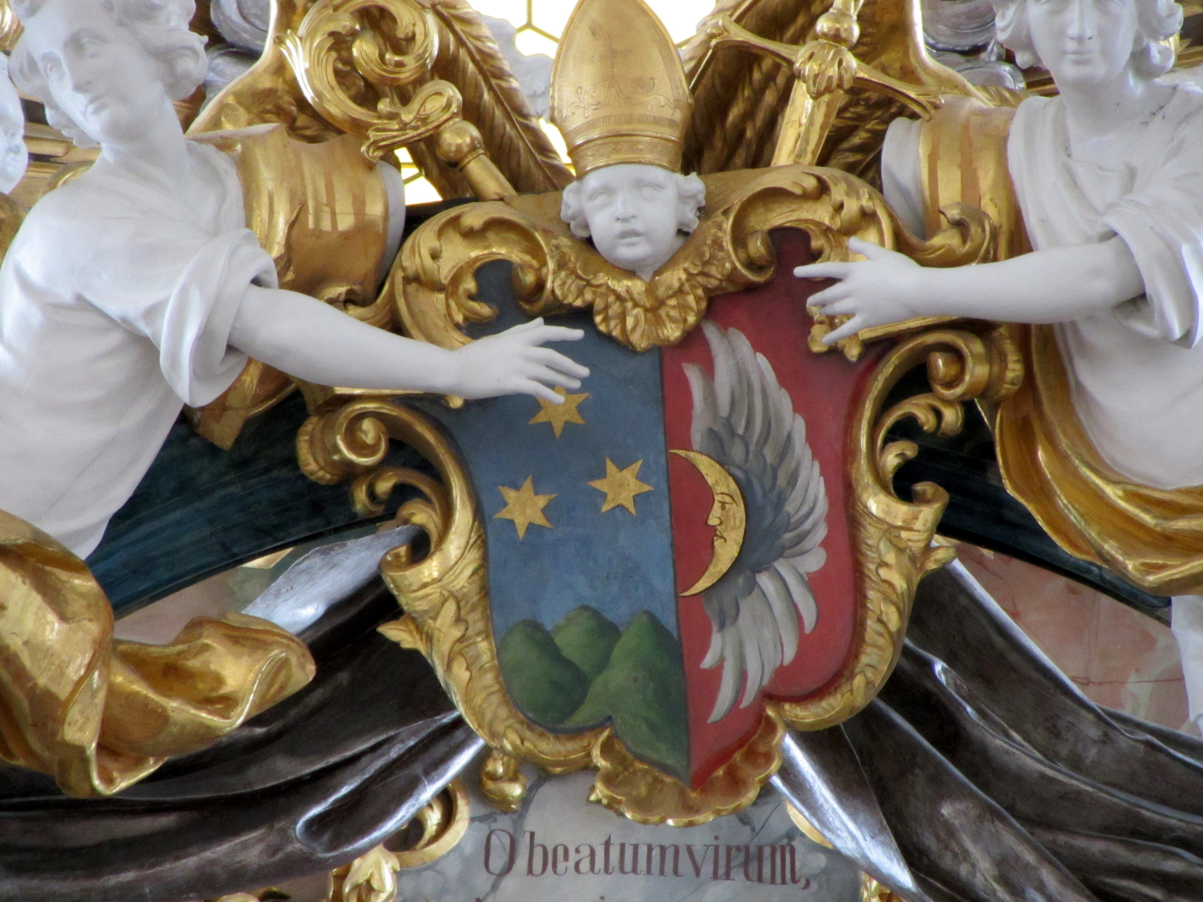 Heilig Geist Fenster